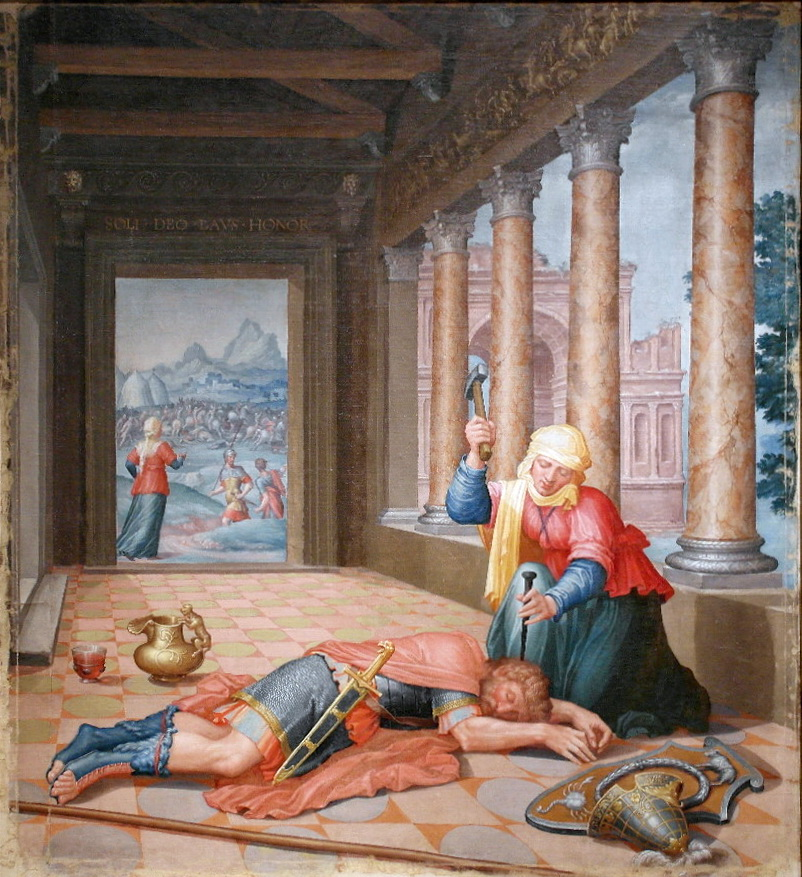 Jaël